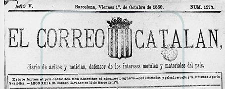 Cabecera de El Correo Catalán